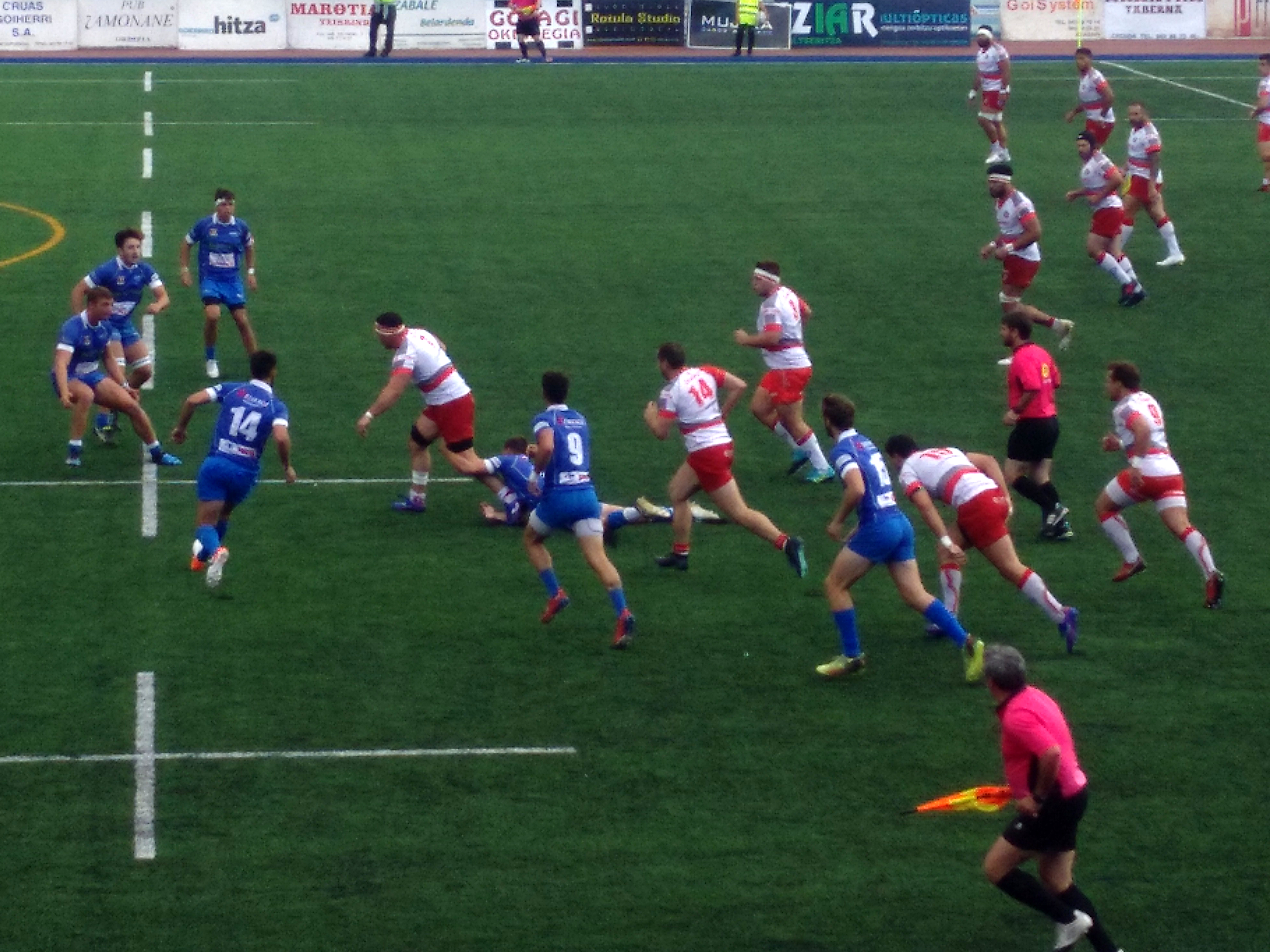 Ordizia vs Angelu rugby match, Euskal Errugbi Liga 2019